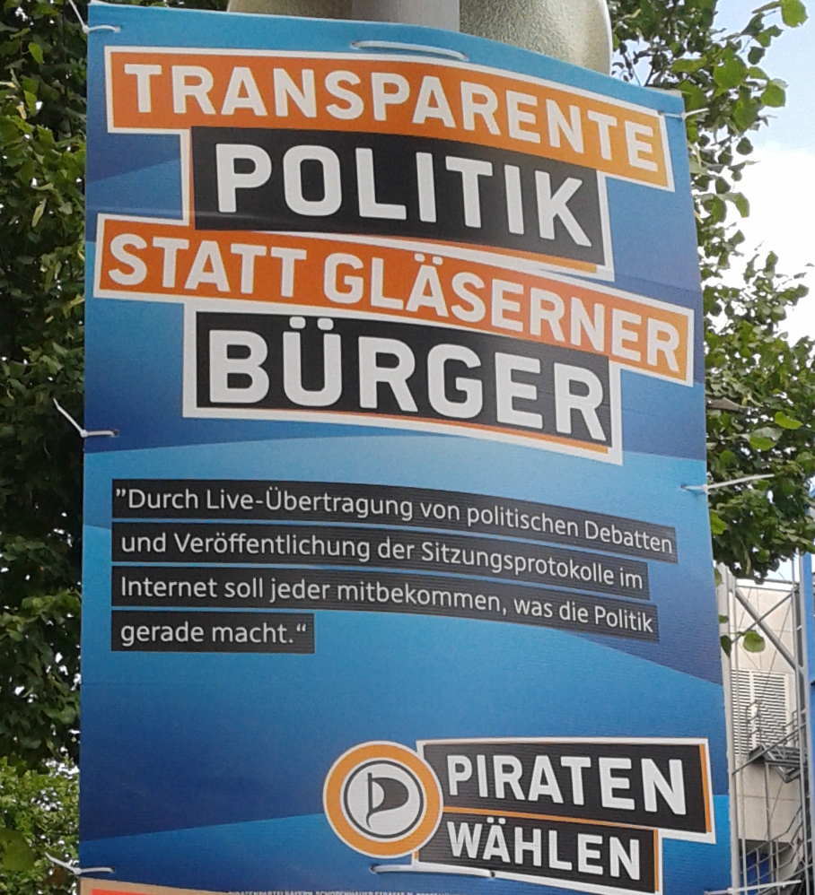 Eine Information zur Bundestagswahl 2013 von den Piraten